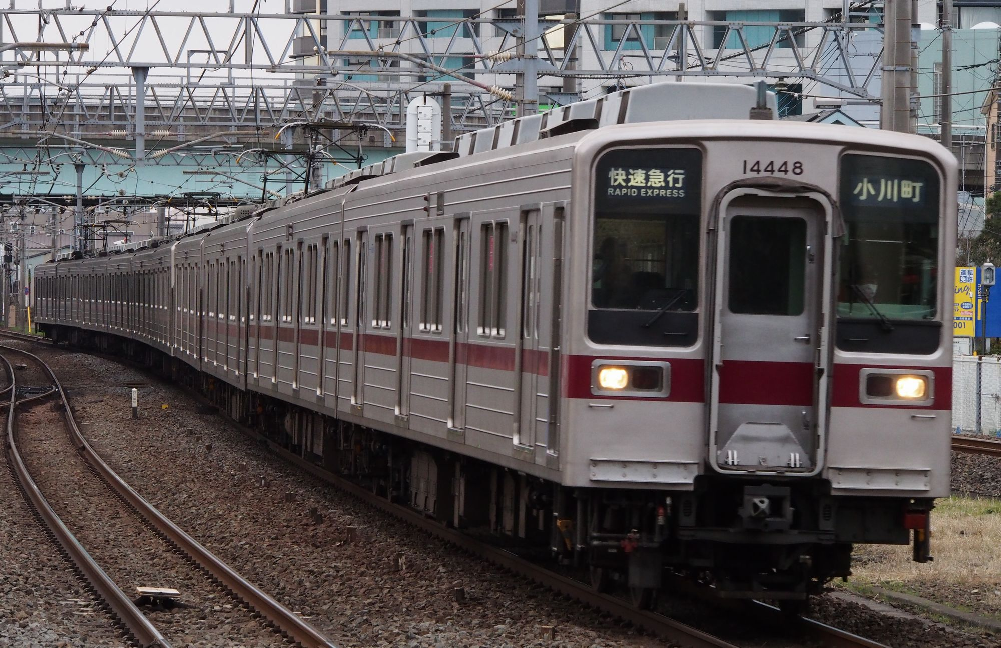 東武10030系10両編成による快速急行。字幕車では行き先表示と同じ紺色地に白文字で表現される。かつての準急も同様であった。（ふじみ野）